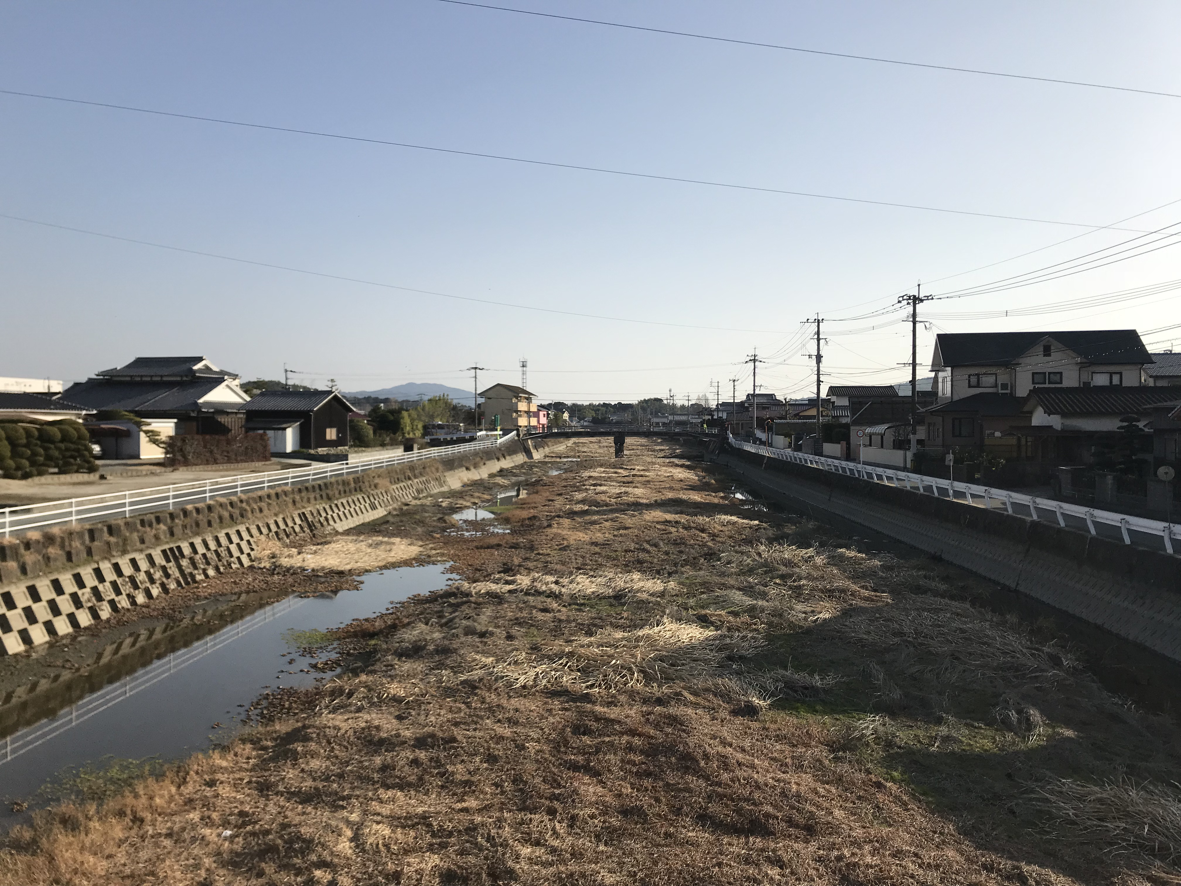 濃施大橋より望む楠田川(上流側)